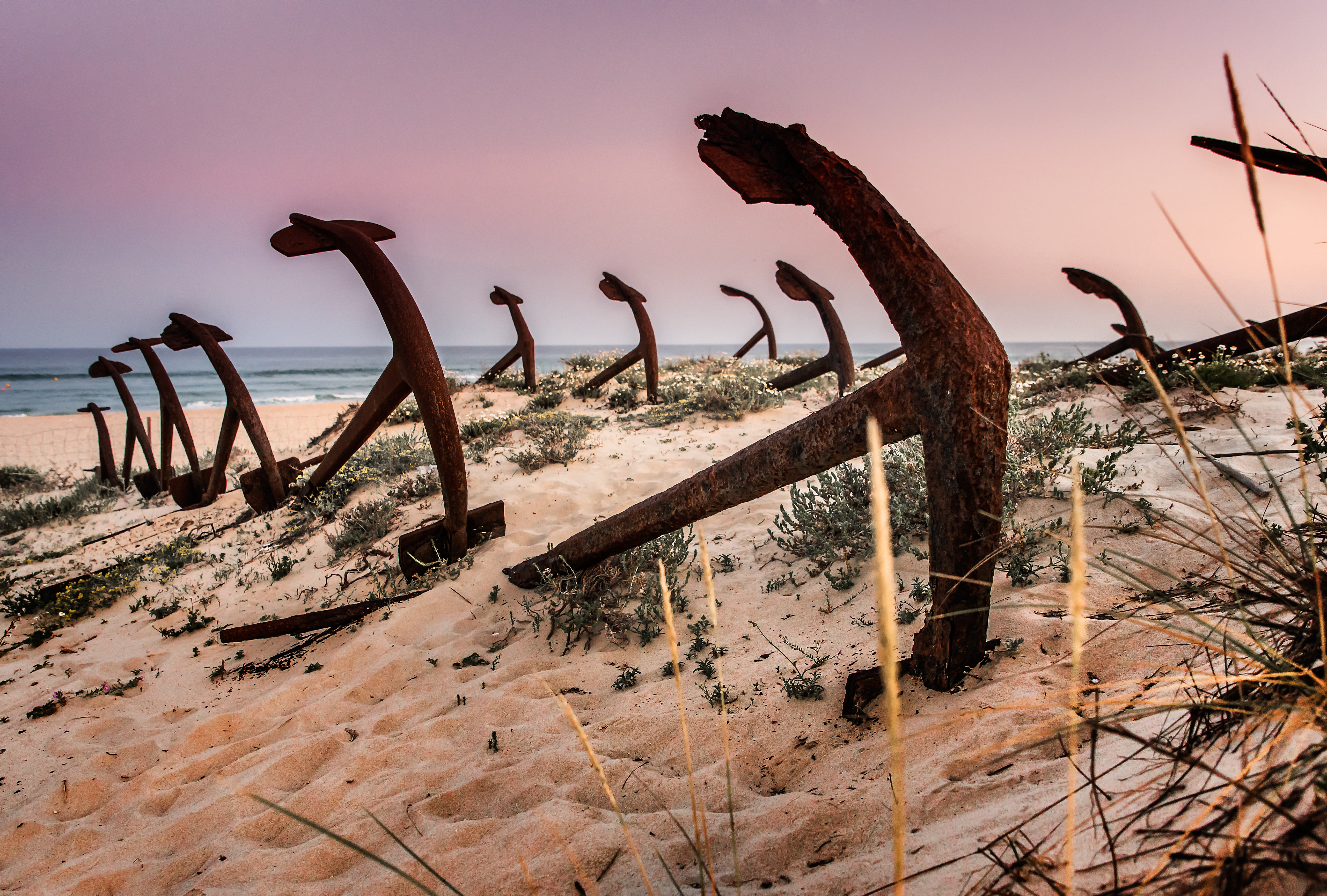 Parque Natural da Ria Formosa This is a photography of a protected area of Portugal indexed in the World Database on Protected Areas with the ID: 4724 (WDPA)